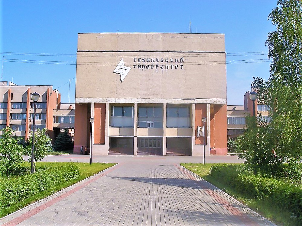 Центральный корпус ЛГТУ - Липецкого государственного технического университета